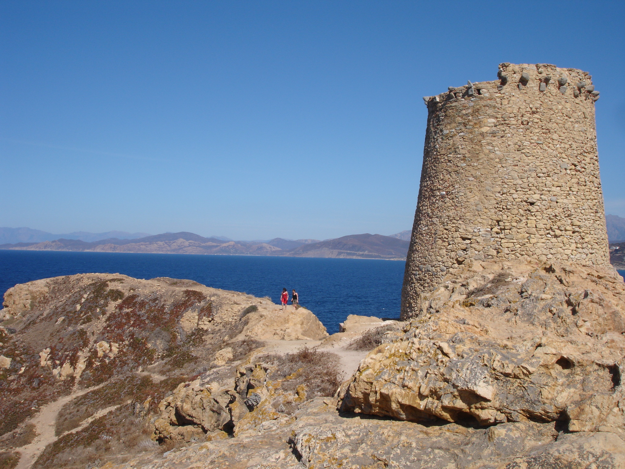 France, Haute-Corse (2B), île-Rousse, tour génoise de la Pietra